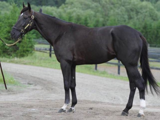 Bild på Nuncio, sommaren 2015, på Stall TZ:s gård, Tillinge-Åby utanför Enköping.